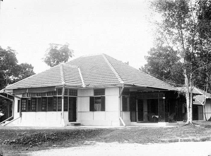 Repronegatief. Pasanggrahan (verblijfhotel) van de Biliton Maatschappij op het eiland Poeloe Bintan bij Straat Kidjang.. Woonhuis te Pasanggrahan